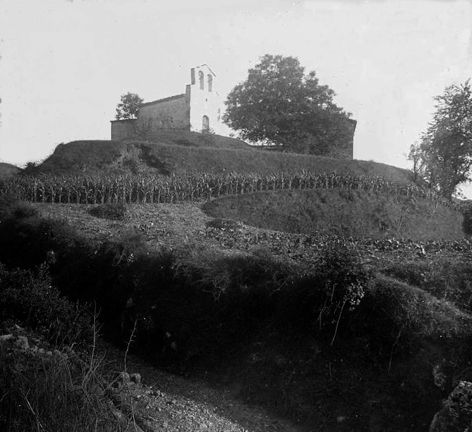 Capella de Can Cabra a Llinars. Josep Salvany i Blanch (1919)